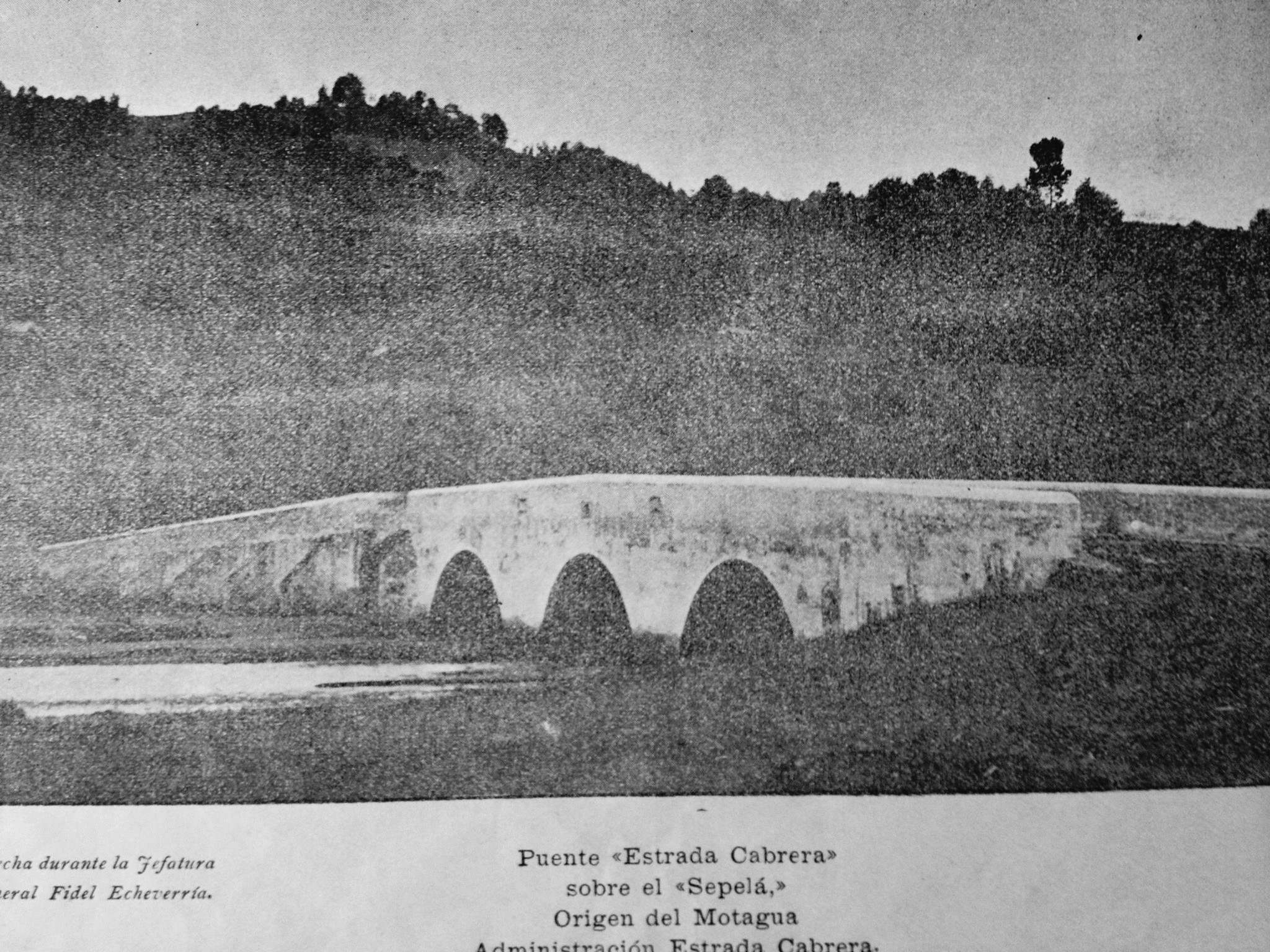 Obra física construida por el general Fidel Echeverría Flores en Quiché. Puente «Estrada Cabrera» sobre el Sepelá, nacimiento del río Motagua. 1907